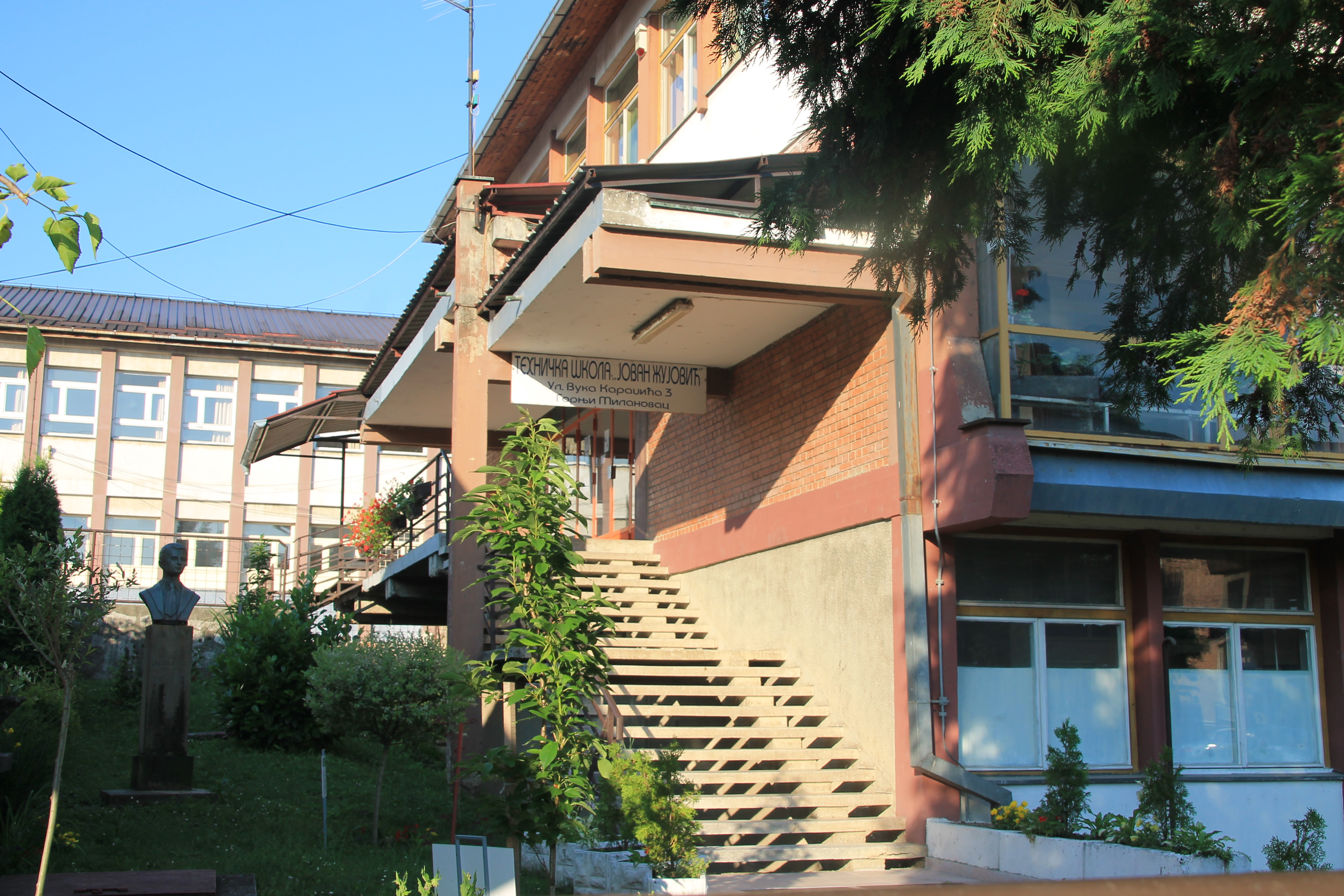 Gornji Milanovac